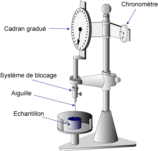 Représentation d'un pénétromètre permettant de réaliser l'essai de perméabilité à l'aiguille, indicateur caractérisant la dureté d'un bitume.